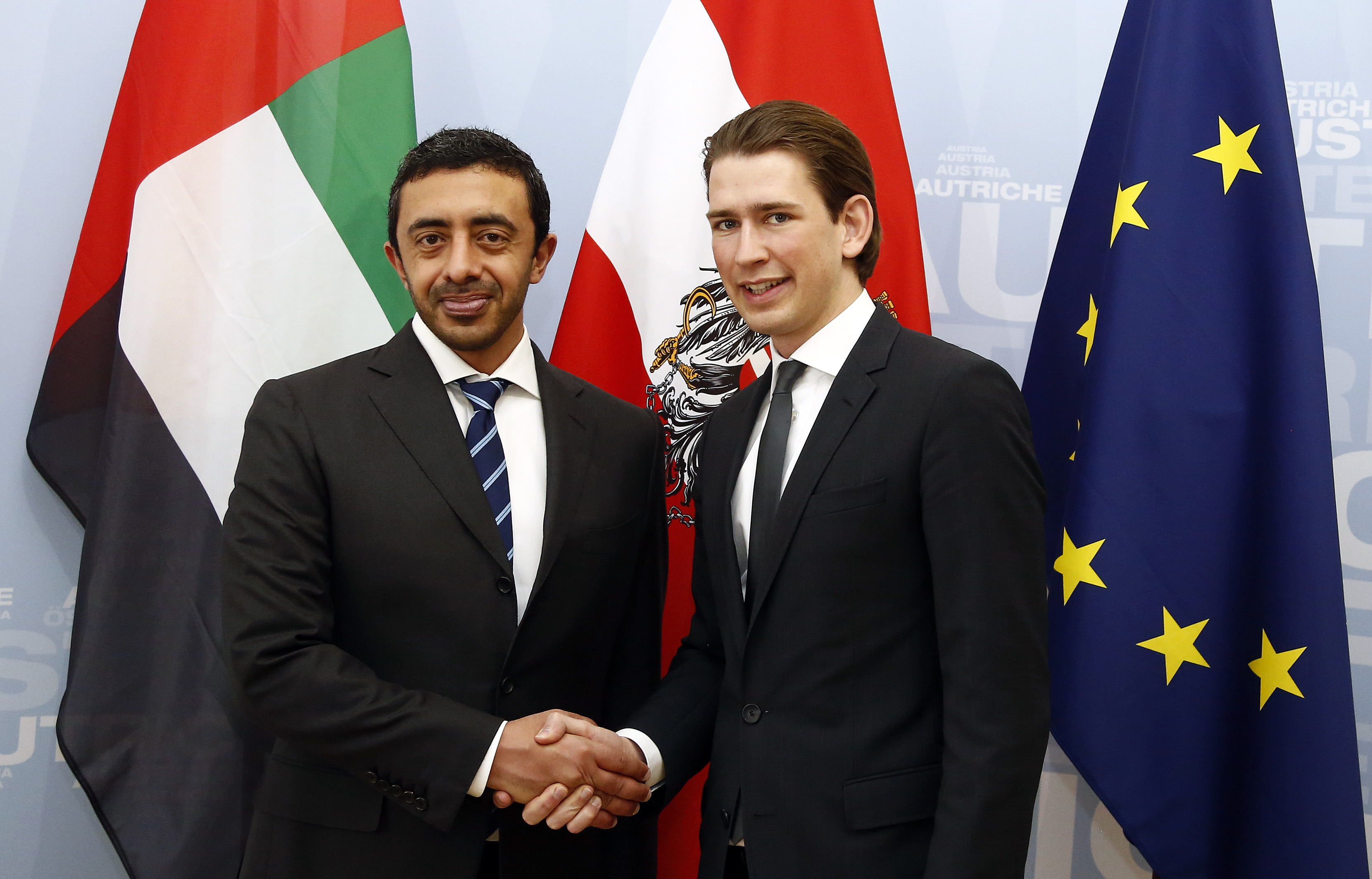 Außenminister Sebastian Kurz trifft den Außenminister der Vereinigten Arabischen Emirate, Abdullah bin Zayed bin Sultan Al Nahyan. Wien, 21.03.2014, Foto: Dragan Tatic